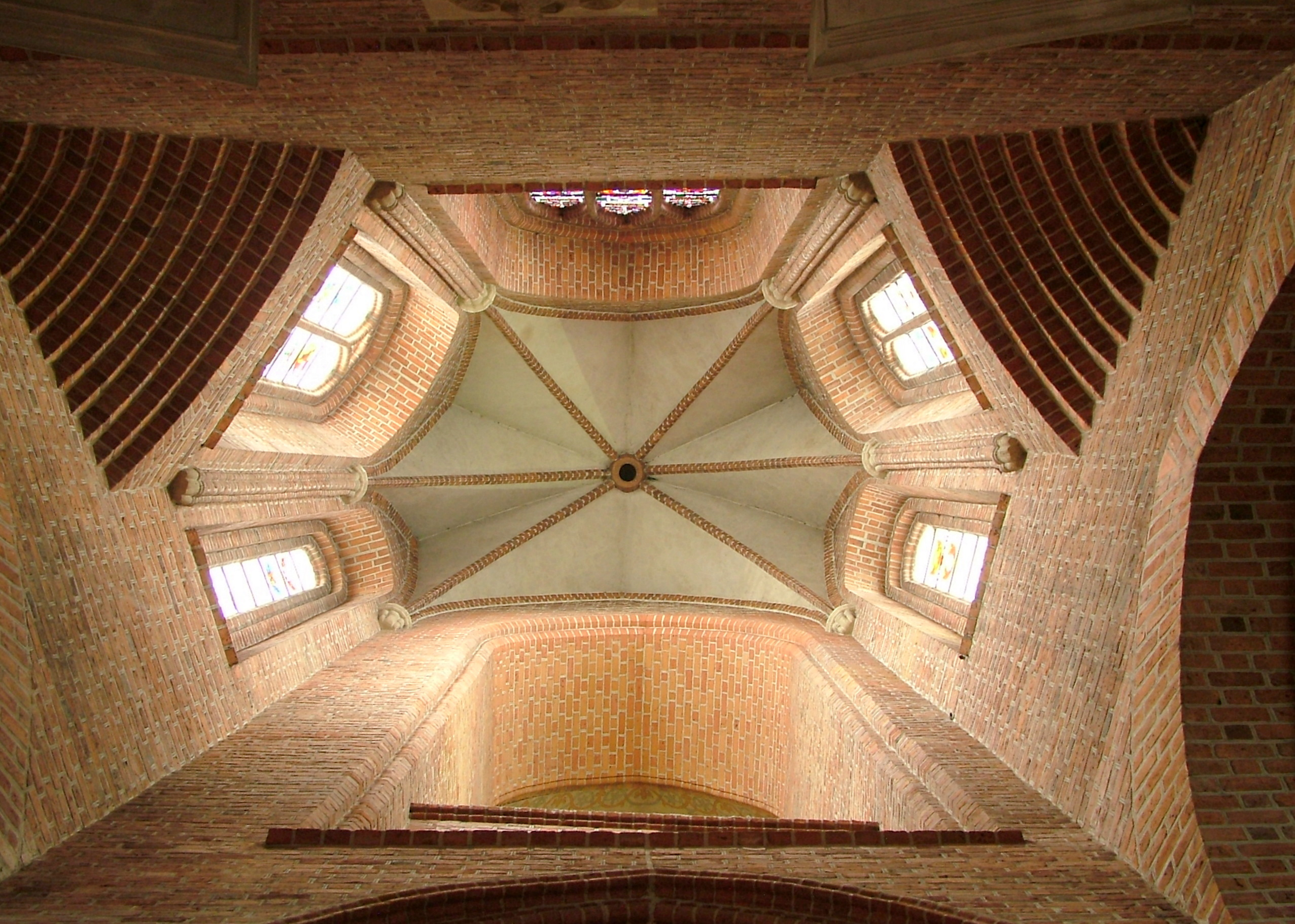 Posener Kathedrale, Turm Innenseite von unten